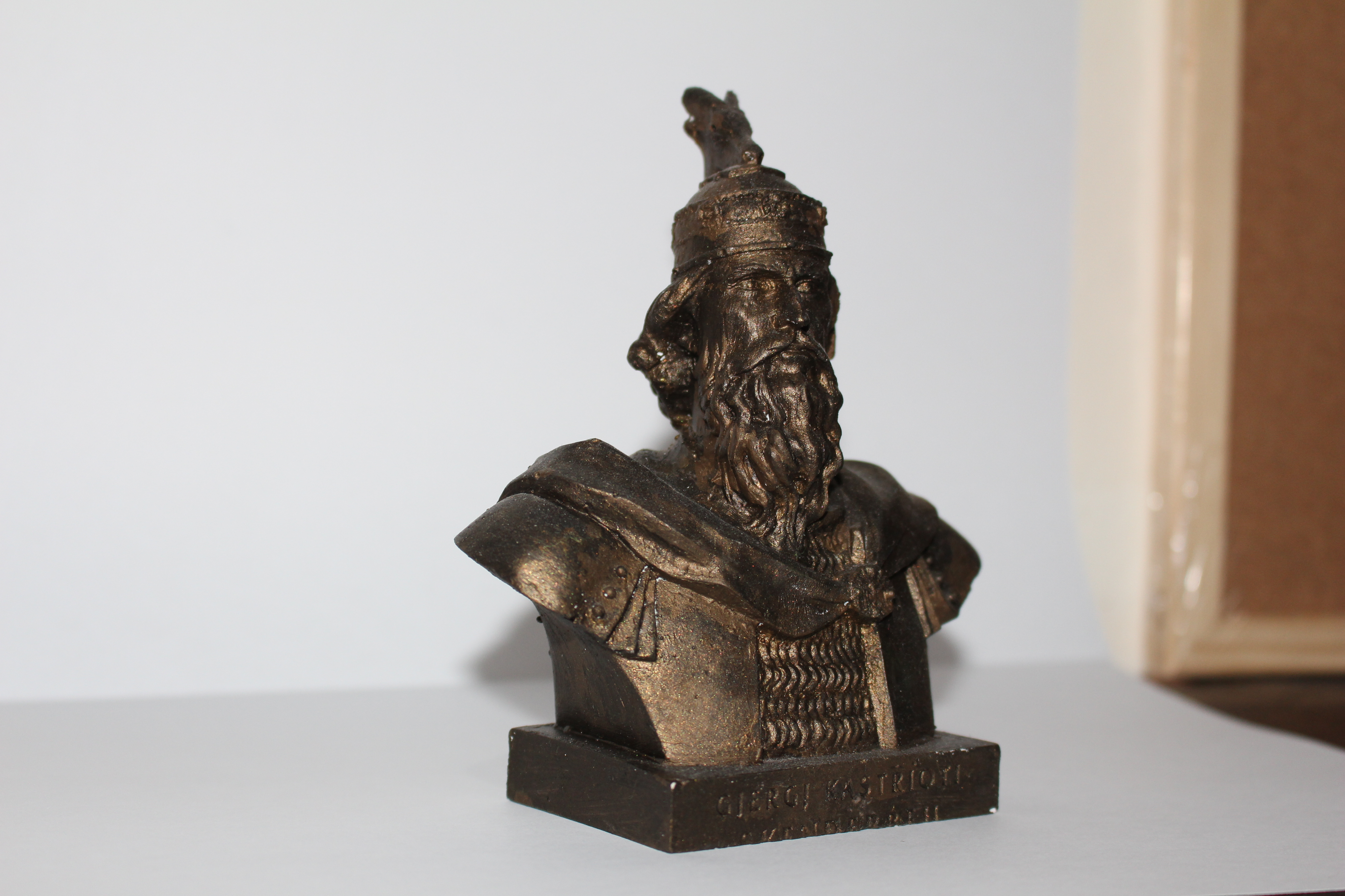 Skulpture